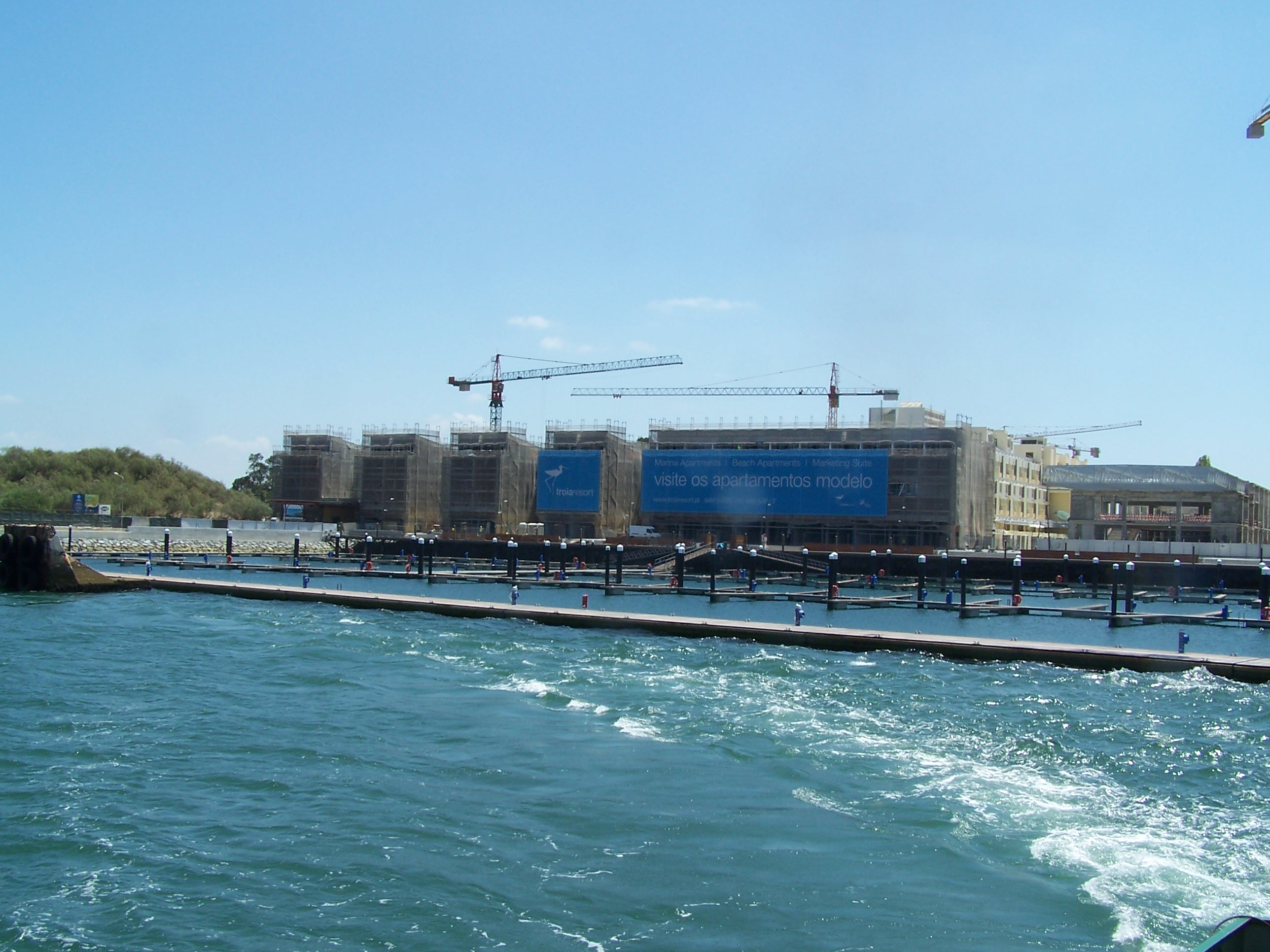 (Troia nova marina)- Tróia foi uma estação lusitano-romana situada na península do mesmo nome, na extremidade da freguesia do Carvalhal, em Grândola, defronte da cidade de Setúbal.